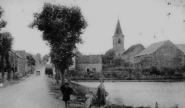 Village de Cérilly en Côte-d'Or (France)